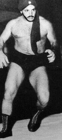 Scott Casey sur un programme de catch du 29 décembre 1975.